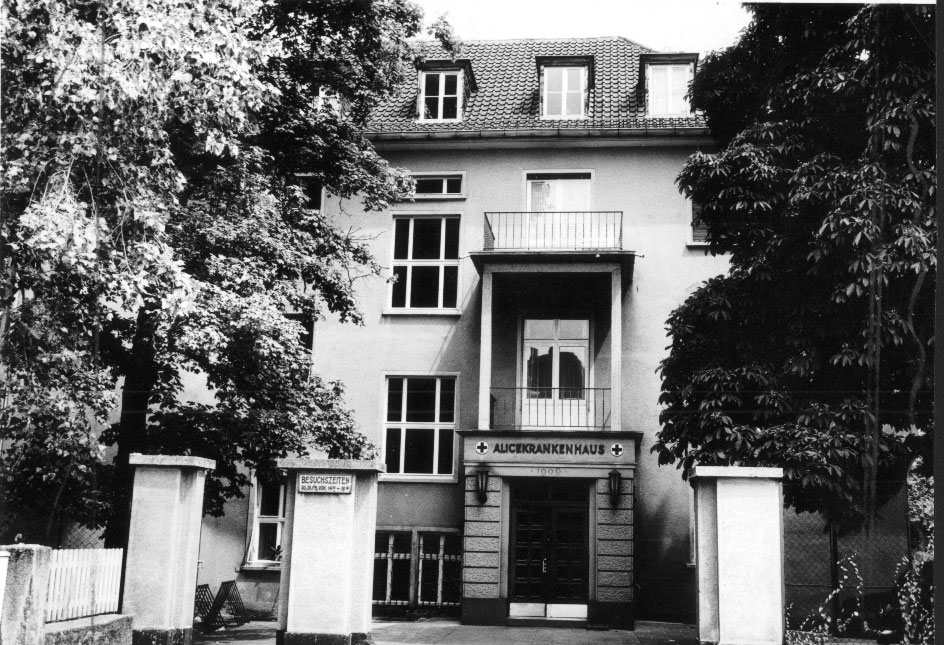 Südeingang Alice Hospital Mainz ca. 1952